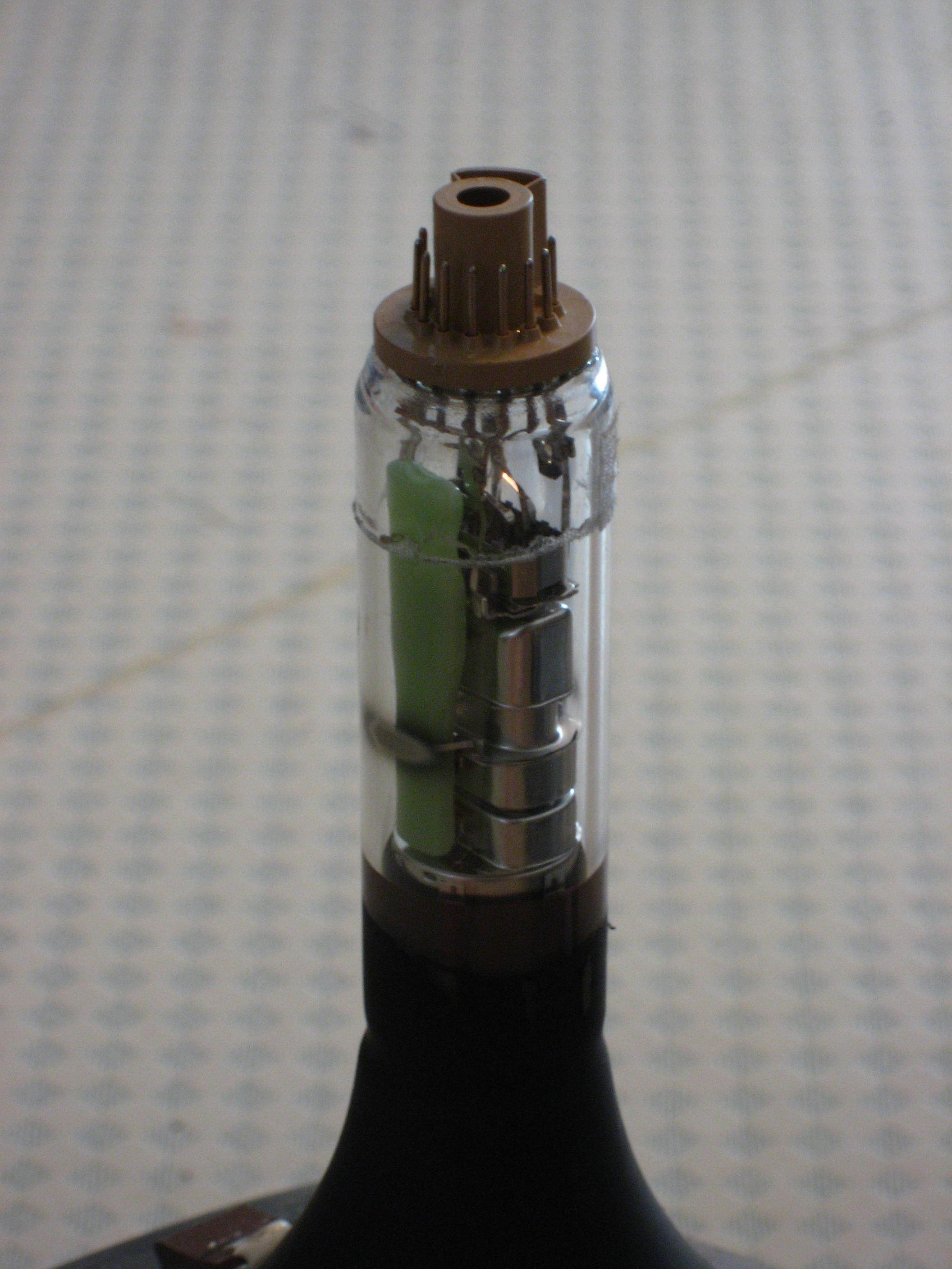 Katodisädeputki